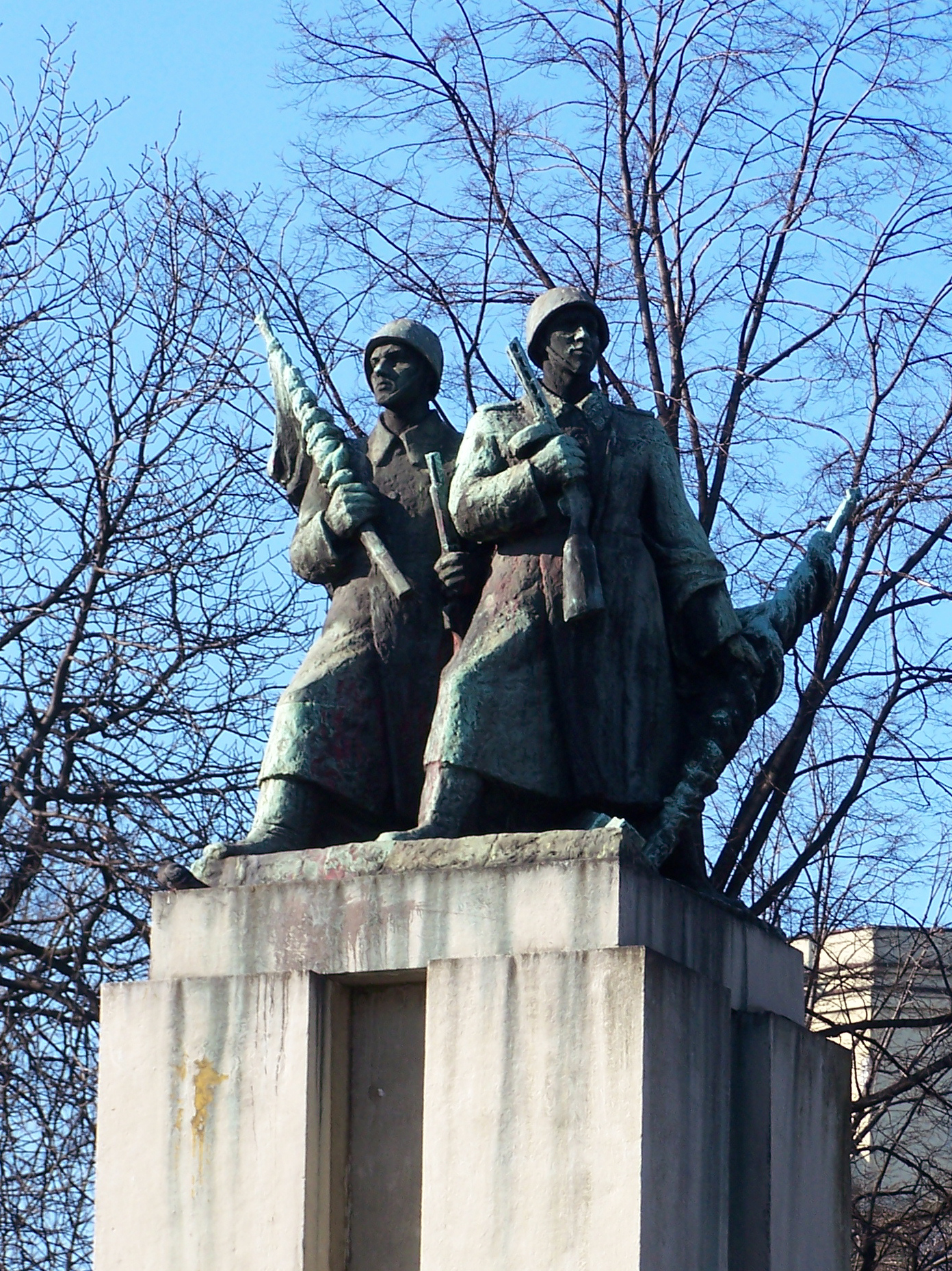 Pomnik żołnierzy radzieckich na Placu Wolności w Katowicach. Pomnik wykonany przez rzeźbiarza Stanisława Marcinowa.